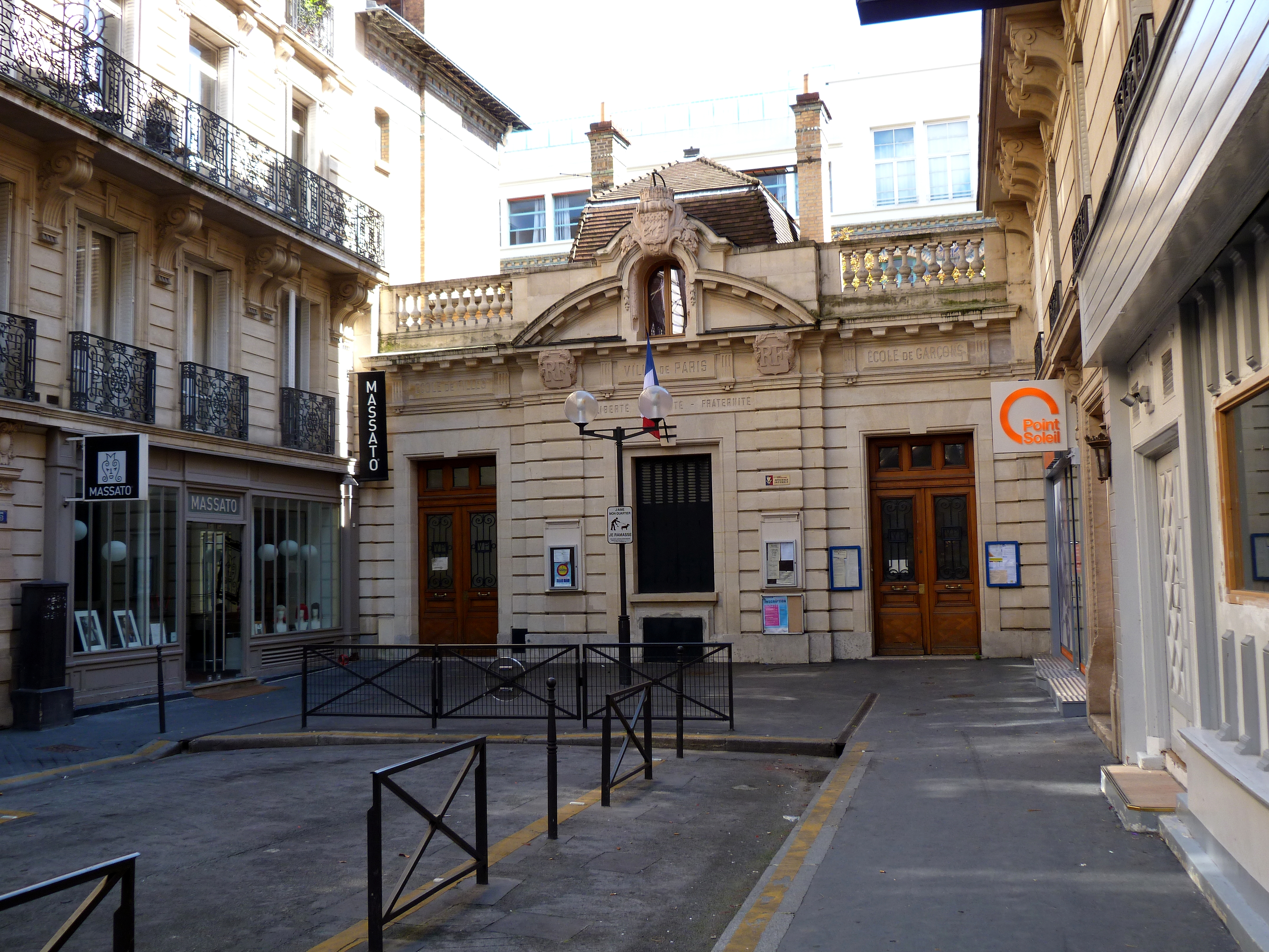 Fond de la rue Robert-Estienne (Paris, 8e arrond.), école maternelle et primaire Robert-Estienne (n°8).